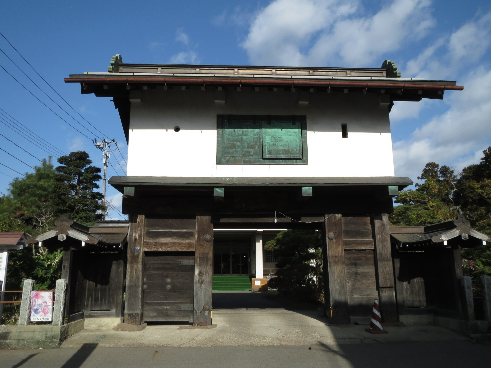 花巻市にある円城寺門 Canon IXY 3